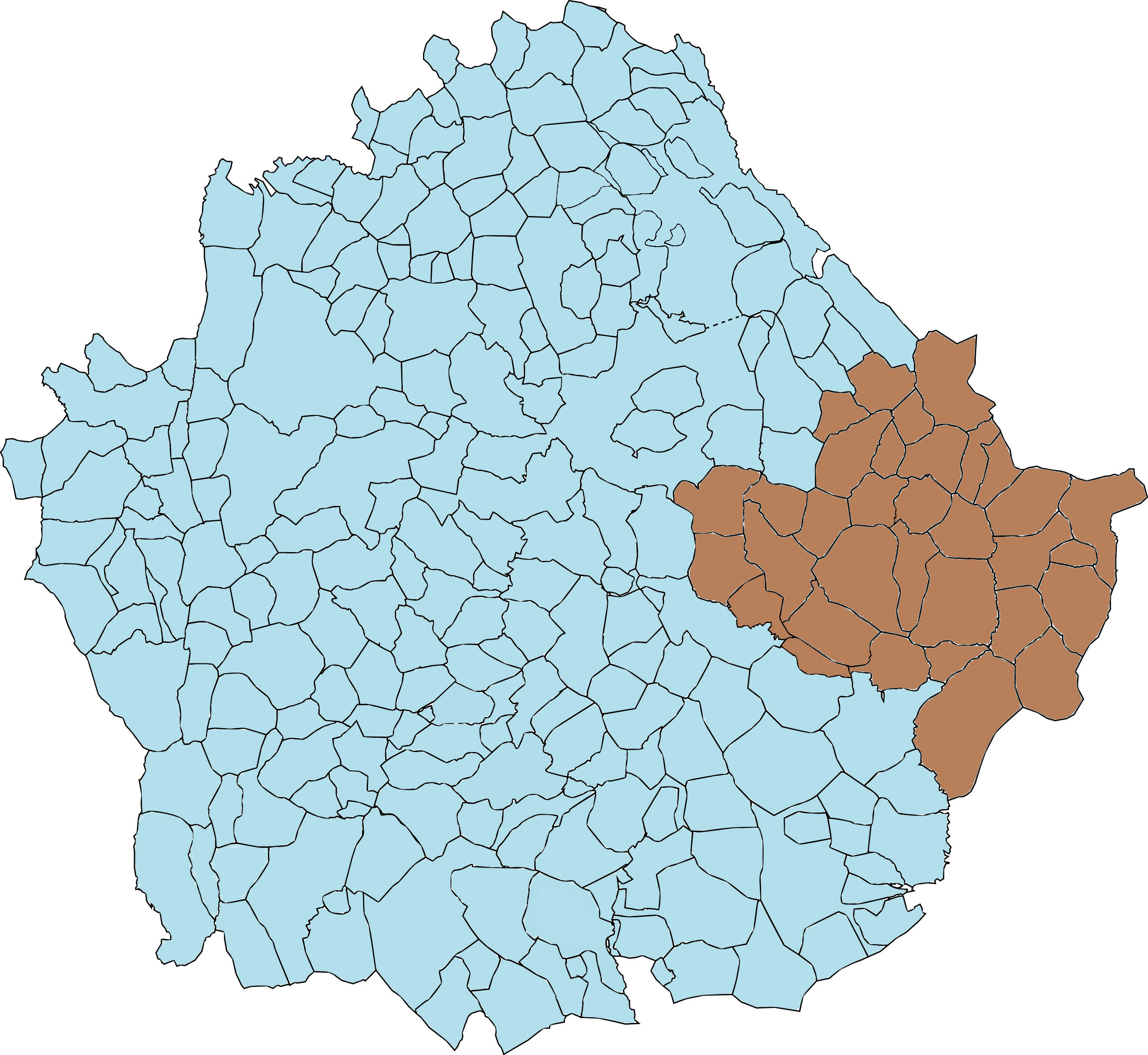 Comarca Serranía Baja